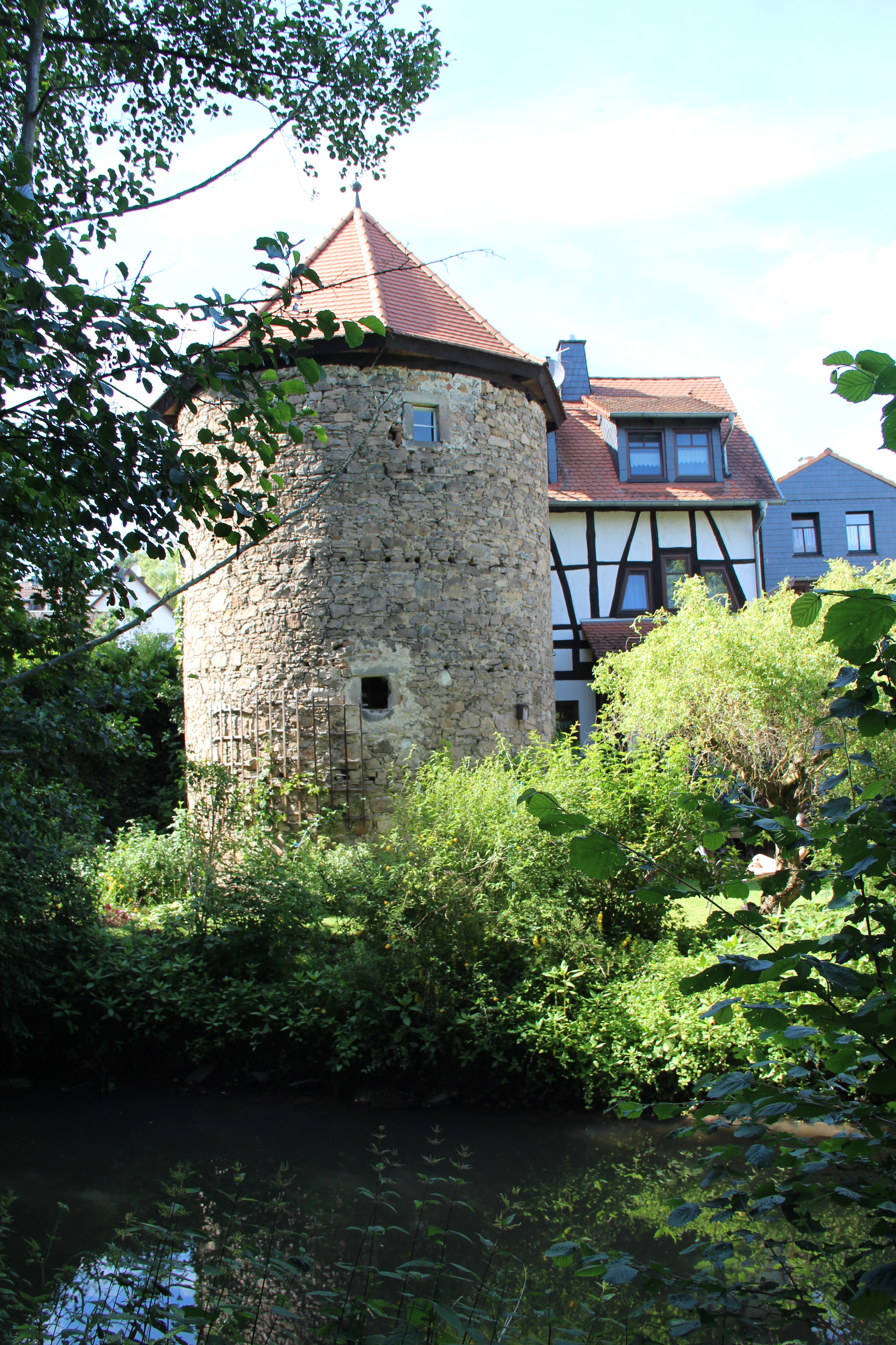 Rundturm der Burg Treis von Süden. Im Vordergrund die Lumda.